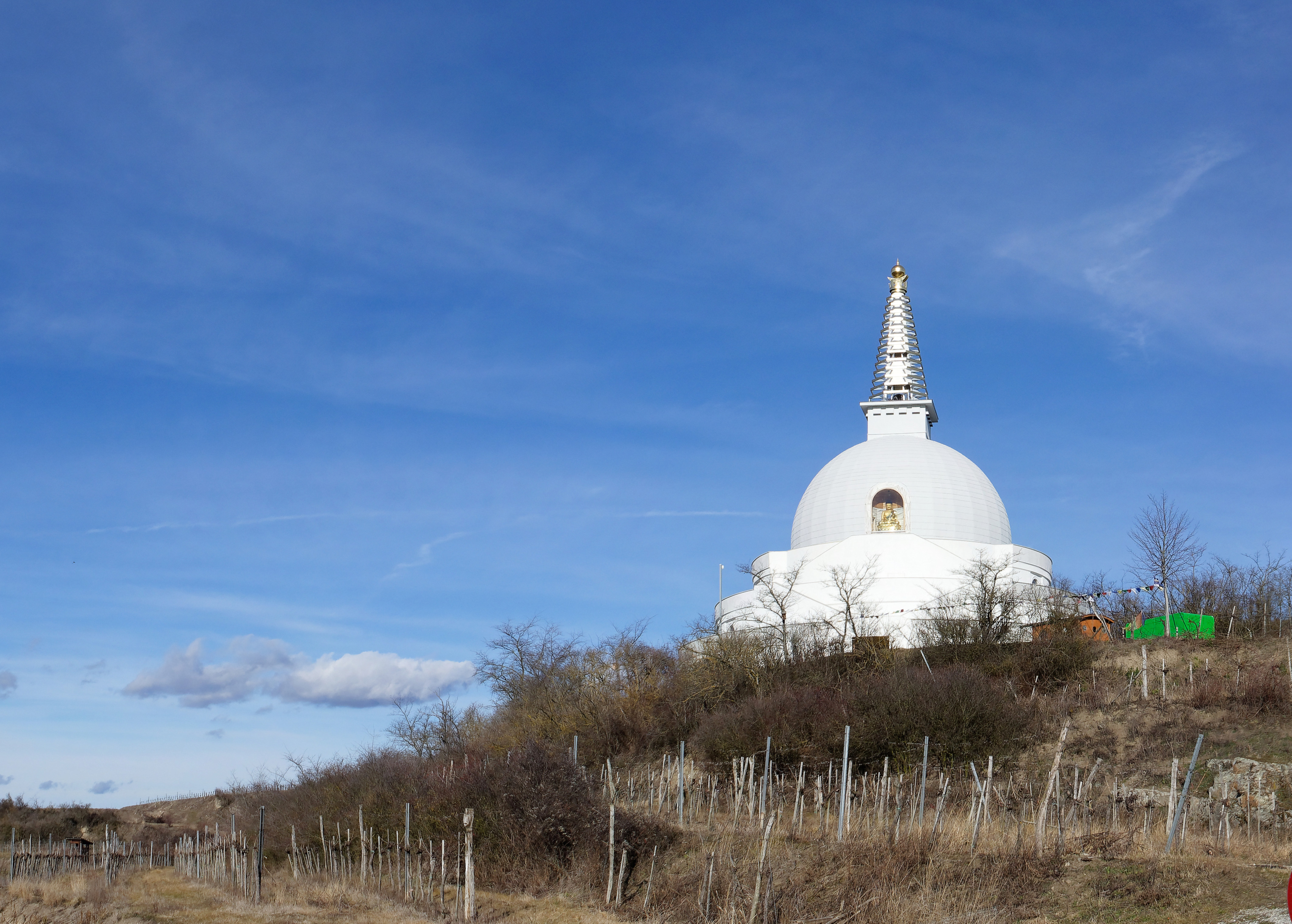 Stupa am Wagram, Ostansicht, Februar 2020